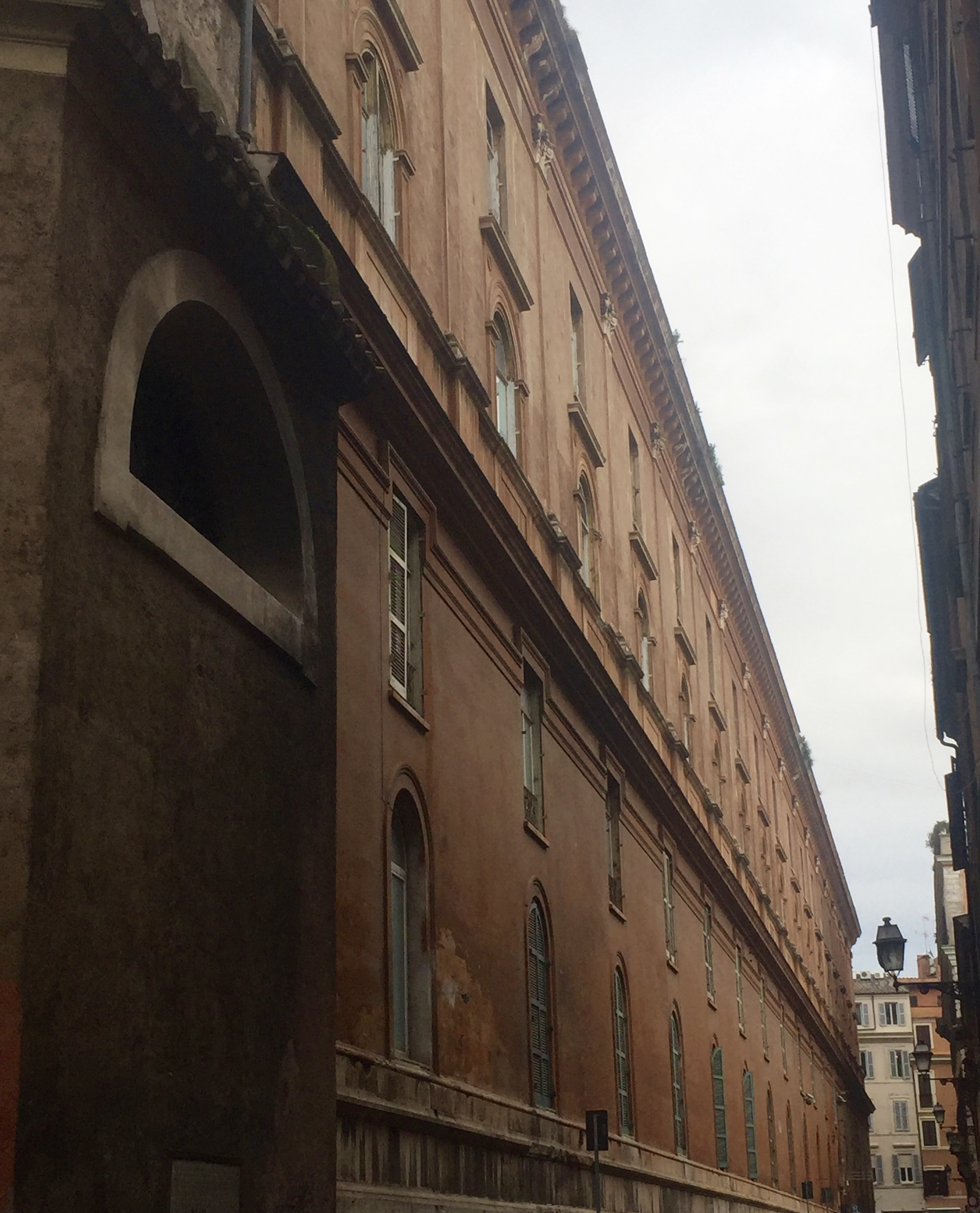 Fiancata Sud dell'Ospedale di San Giacomo, che affaccia su via Canova